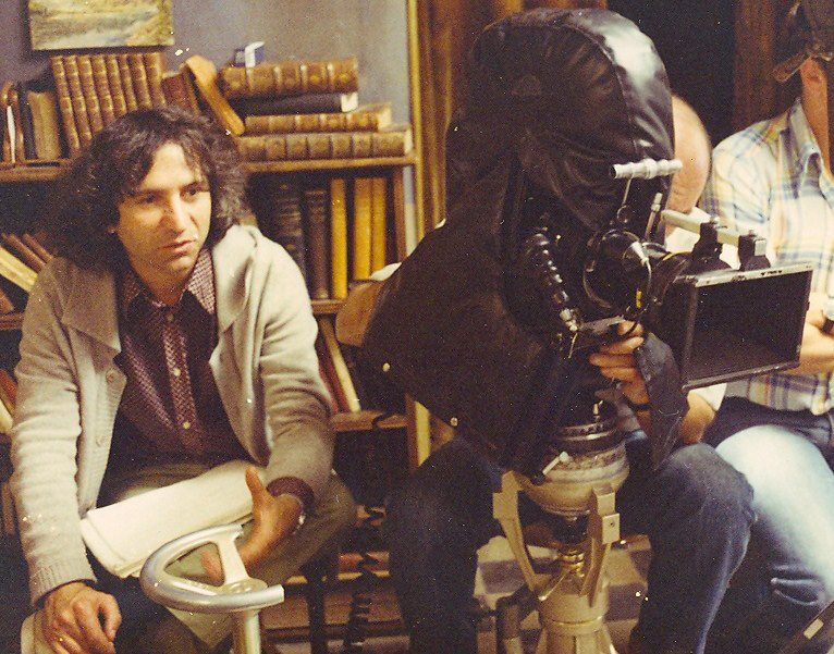 Scène de tournage sur le téléfilm "La Tisane de sarments", réalisé par Jean-Claude Morin, avec Philippe Léotard (1979)